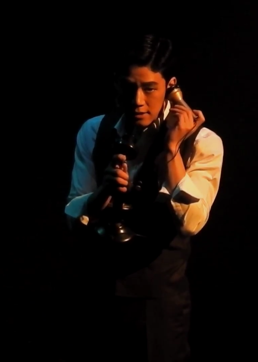 2017 쓰릴미 프레스콜 최재웅 김무열 My Glasses Just Lay Low (내 안경 진정해) 김무열 중심 0202